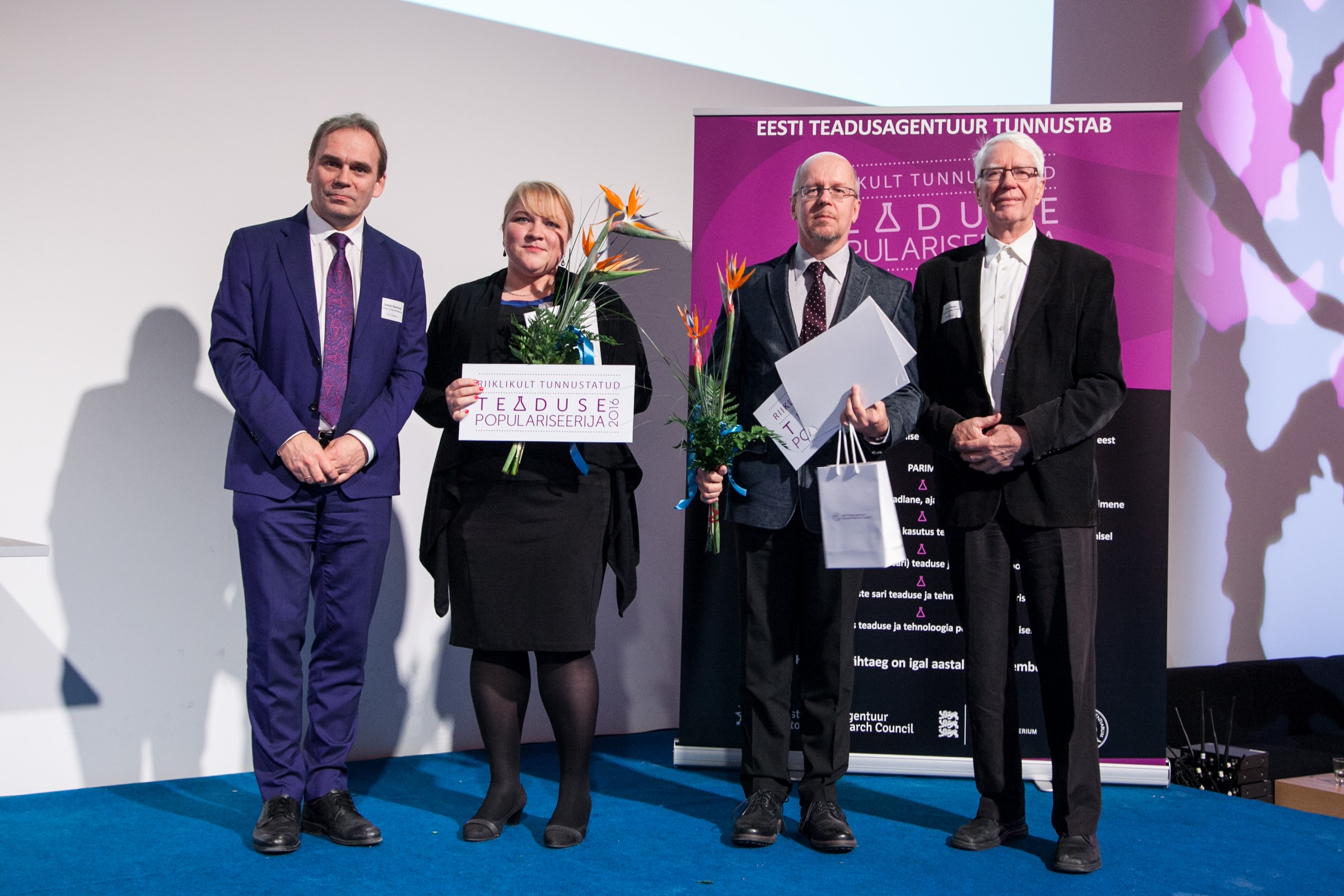 Tiina Laansalu ja Tõnu Tender 2016. aasta teaduskommunikatsiooni konverentsil võtmas vastu teaduse populariseerimise auhinda.